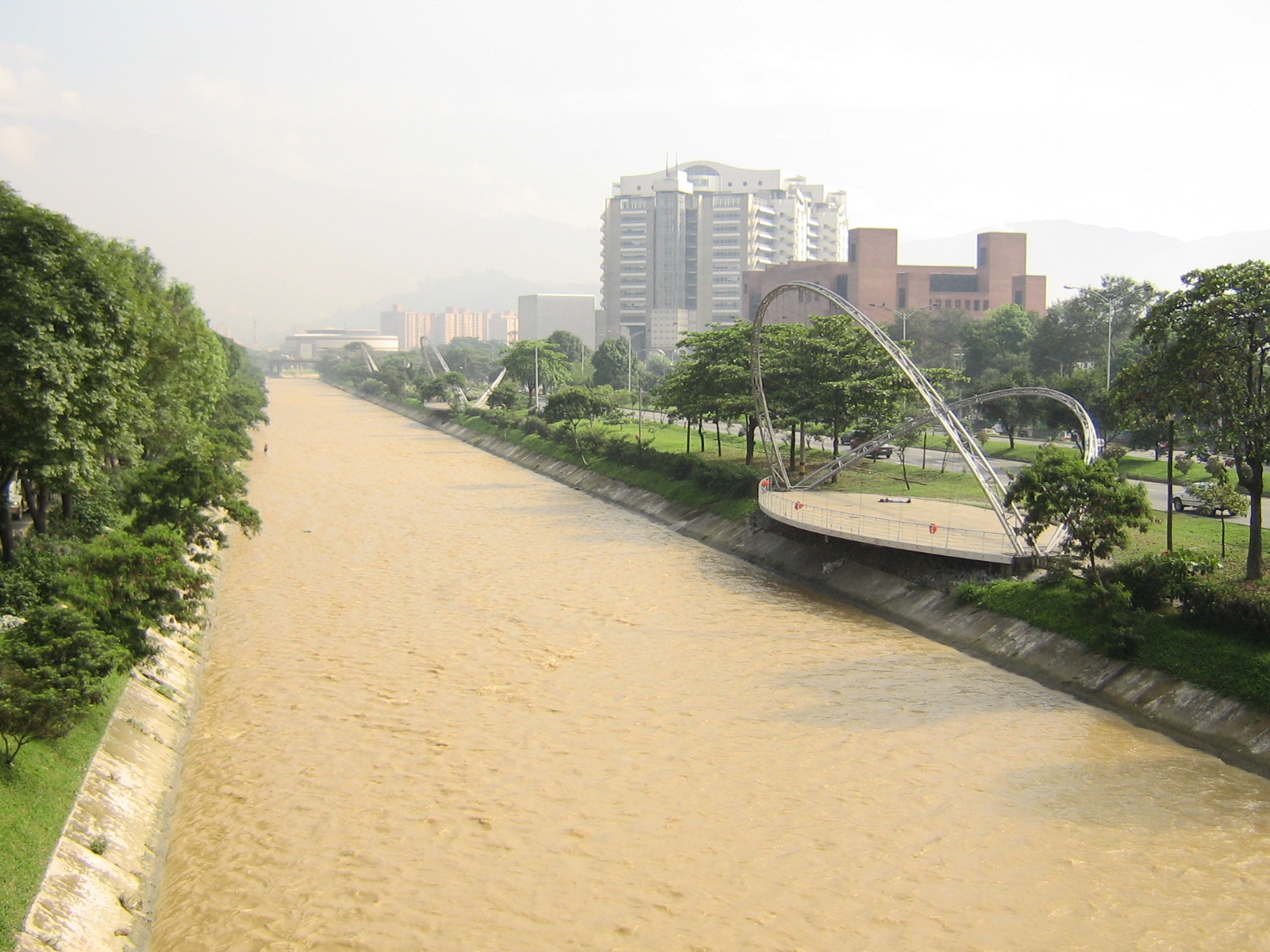 río Medellín (Medellín, Colombia)